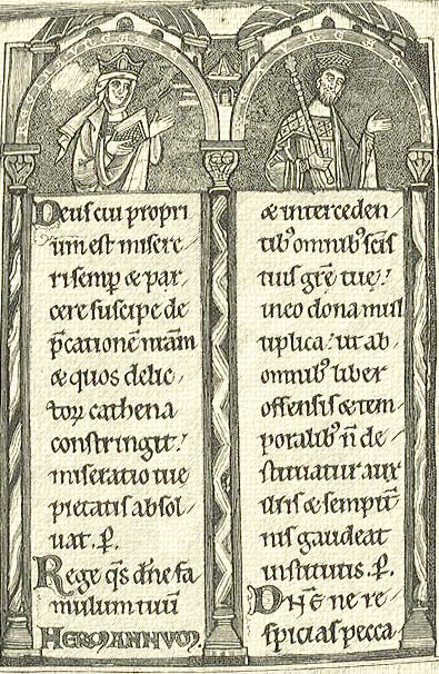 II. András és neje Gertrud arczképével ellátott kódexlap. Hermann thüringiai határgrófnak a XIII. század első felében irt s a stuttgarti kir. könyvtárban őrzött psalteriumából.